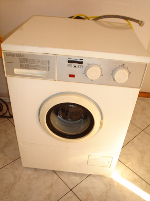 A oto pralka Polar PDA Luna 385A - kolejna polska pralka posiadającą układ elektroniczny, jak Polar Westa-85.